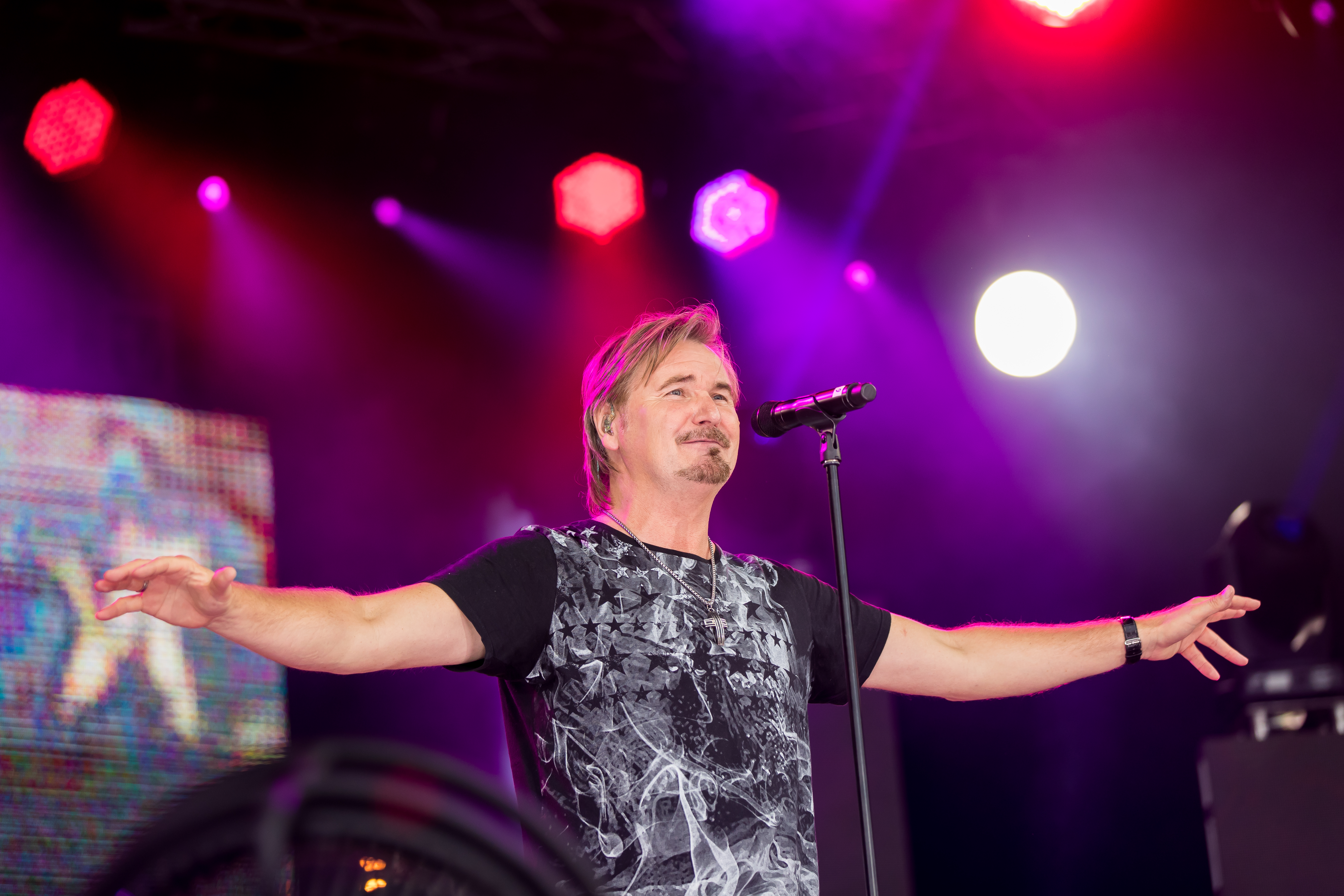 Nik P. during SWR4 Schlagernacht mit Jürgen Drews, Beatrice Egli, Vanessa Mai, Nik P. und Mitch Keller at Technik Museum Speyer, Speyer, Rheinland Pfalz, Germany on 2016-07-24, Photo: Sven Mandel